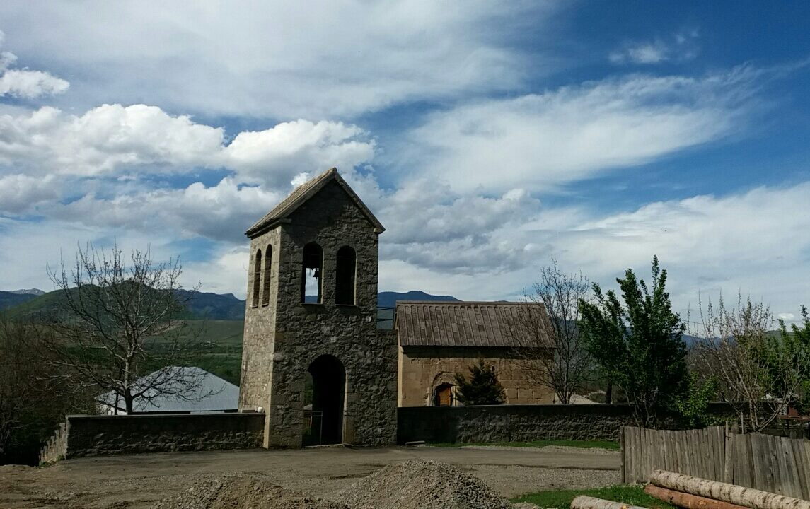 საყუნეთის ეკლესიის სამრეკლო